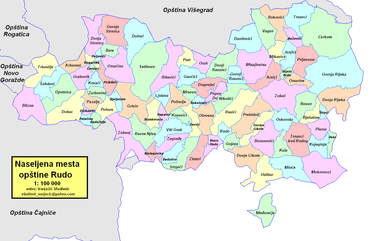 Opština Rudo